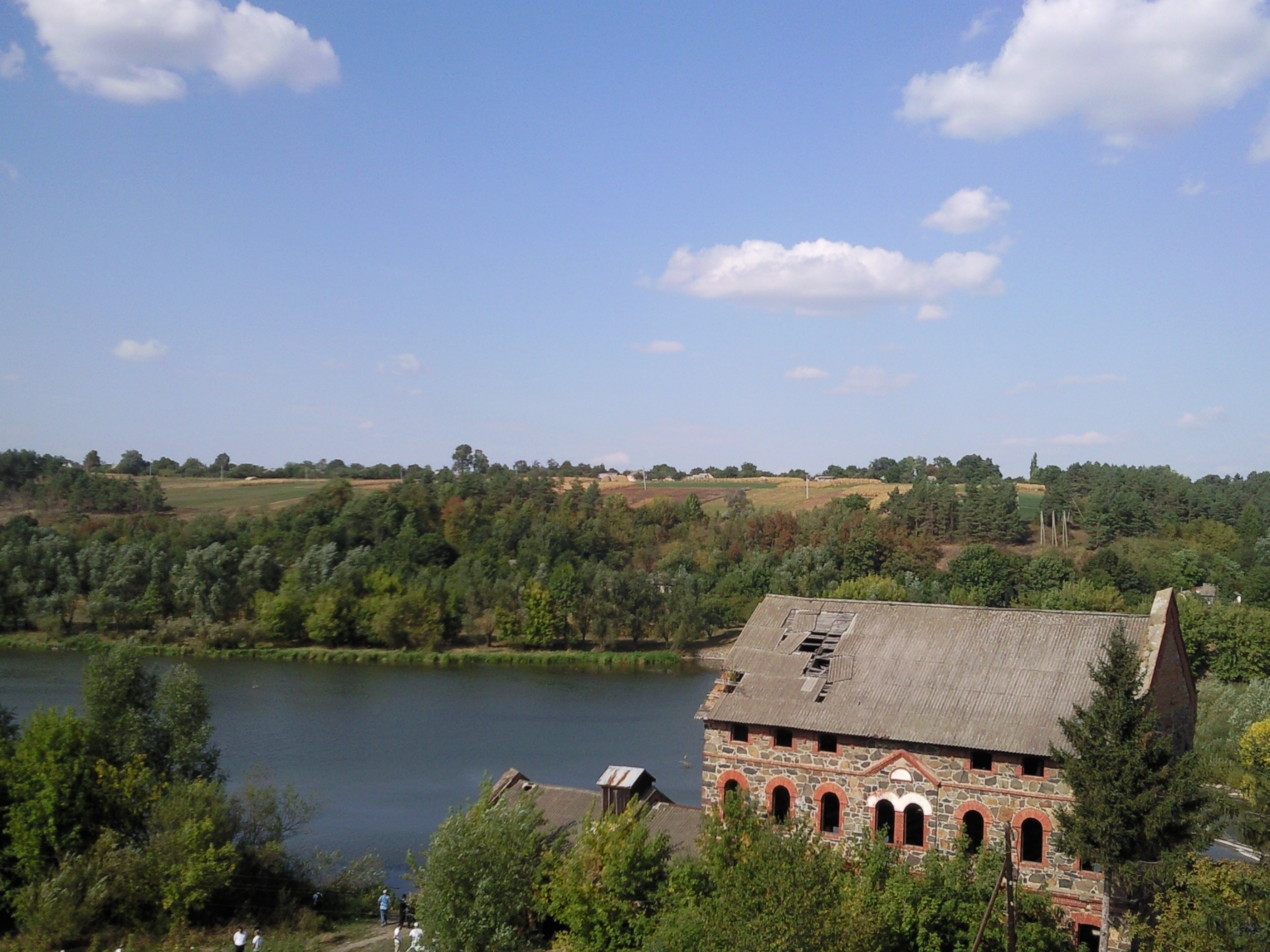 ברסלב